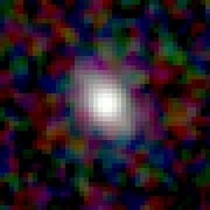 Galaxy NGC 69